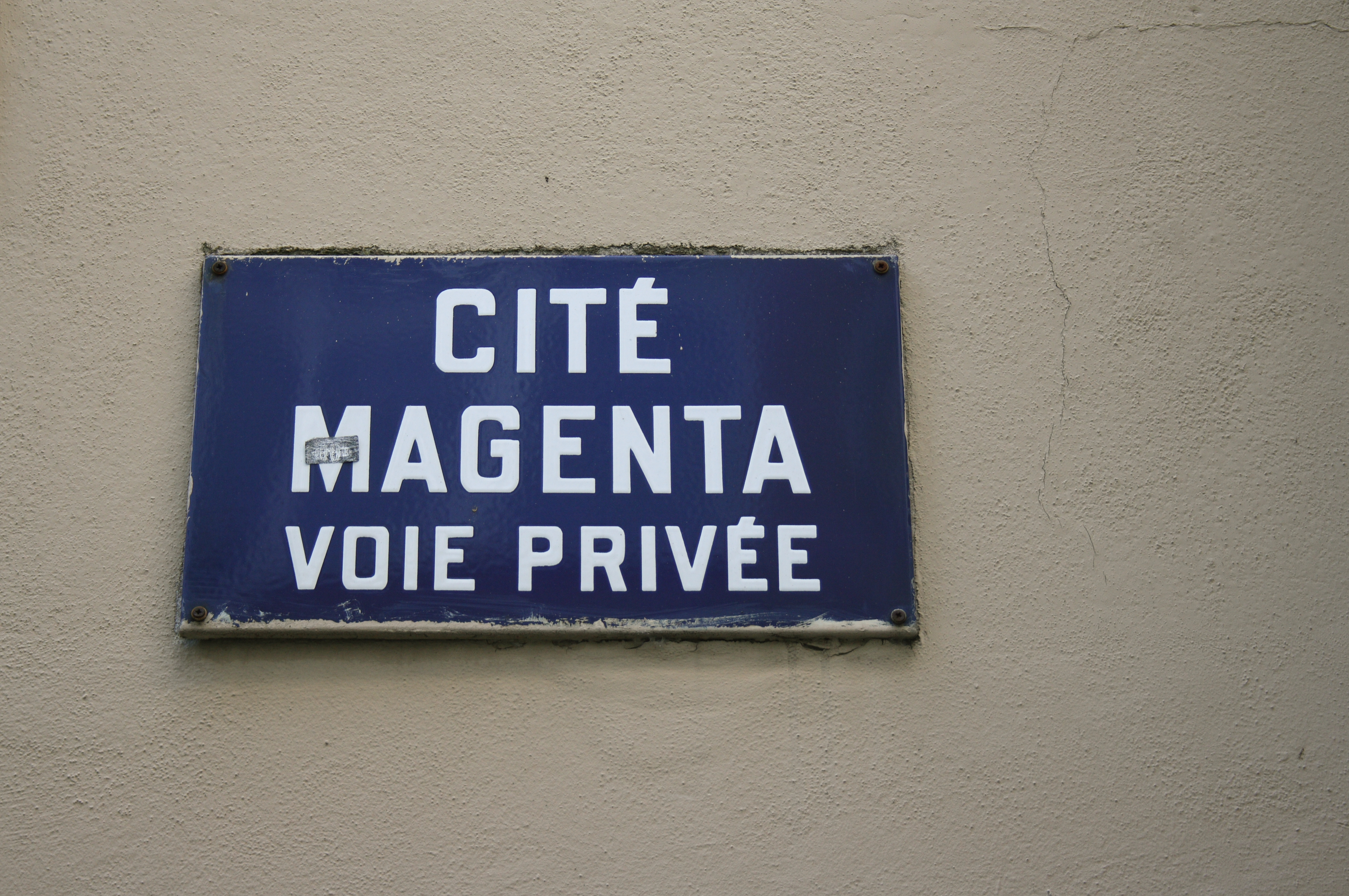 Straßenschild CITÉ MAGENTA im 10. Arrondissement von Paris